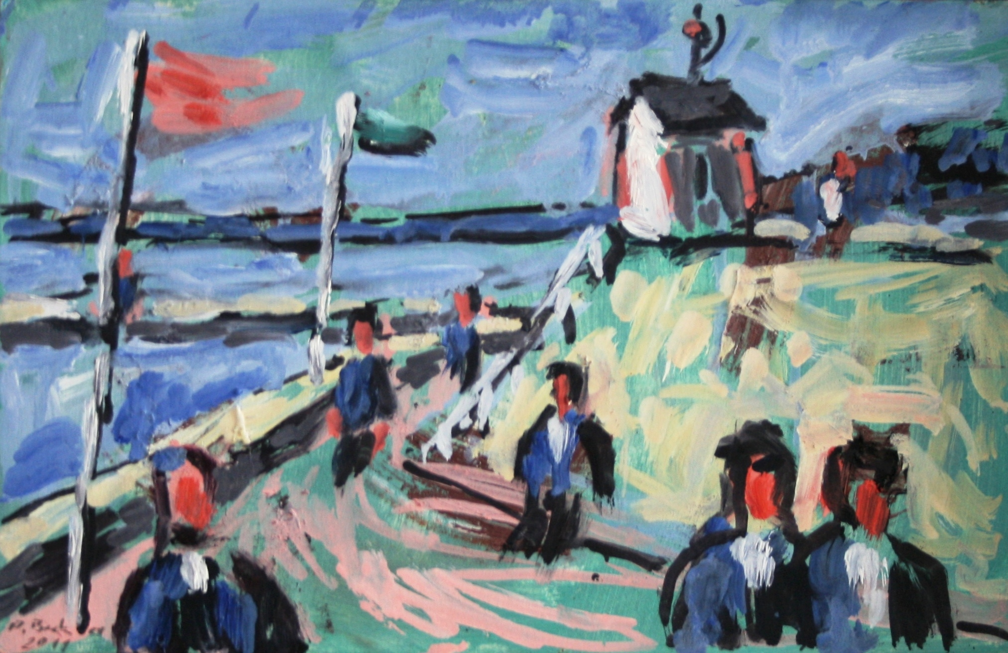 Landschaft Ostsee